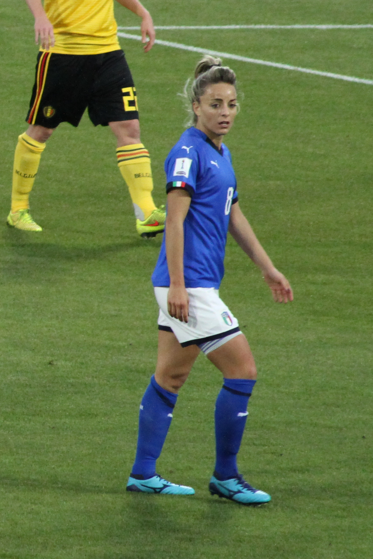 Ferrara, 10 aprile 2018: Italia vs Belgio, qualificazioni al Mondiale di Francia 2019.